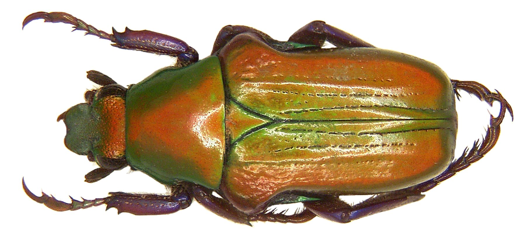 Familie: Scarabaeidae Groesse: 13 mm Fundort: Madagascar Foto: U.Schmidt, 2006